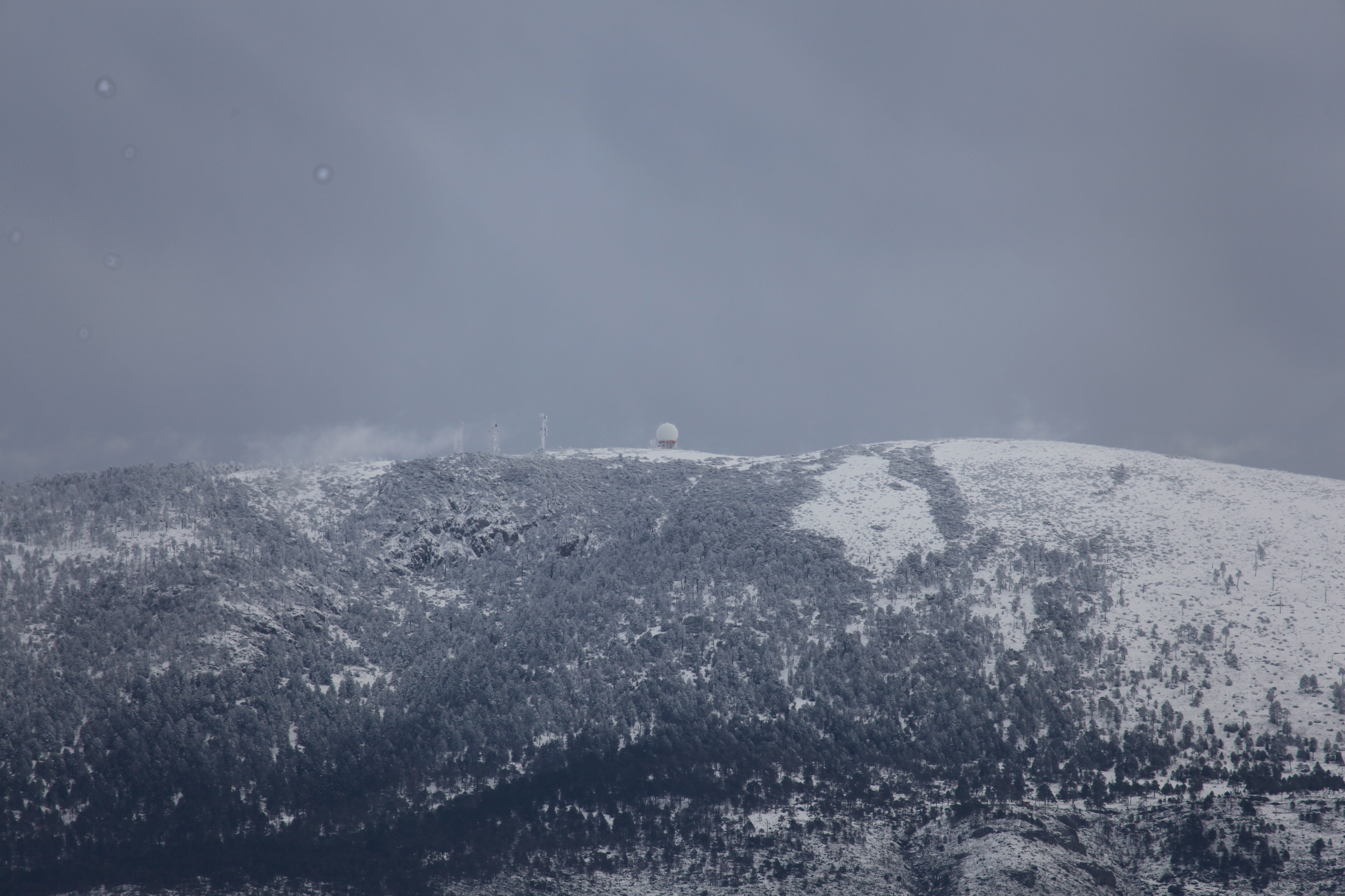 El Potosí nevado-febrero/2012